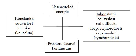 Schéma synchronicity ve vazbě na kauzalitu, prostor a čas z knihy C.G.Jung W.Paili Příroda a duše (ISBN 978-80-7530-117-8) - str.97 (2018)